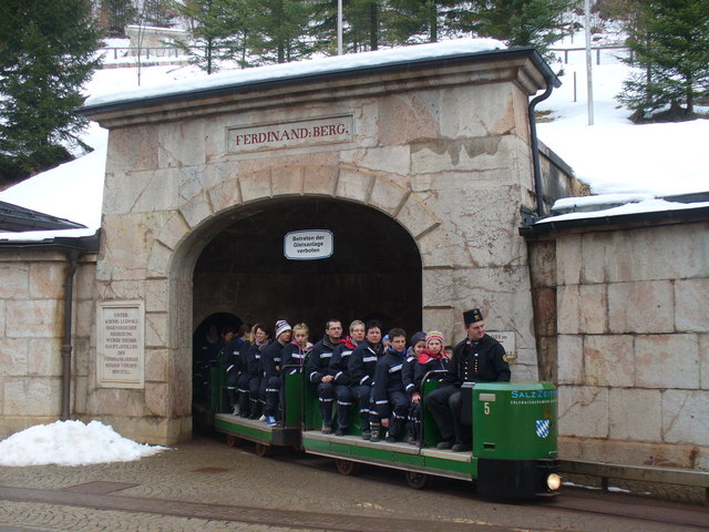 Salzbergwerk Berchtesgaden Grubenbahn (Berchtesgaden Salt Mine Train)